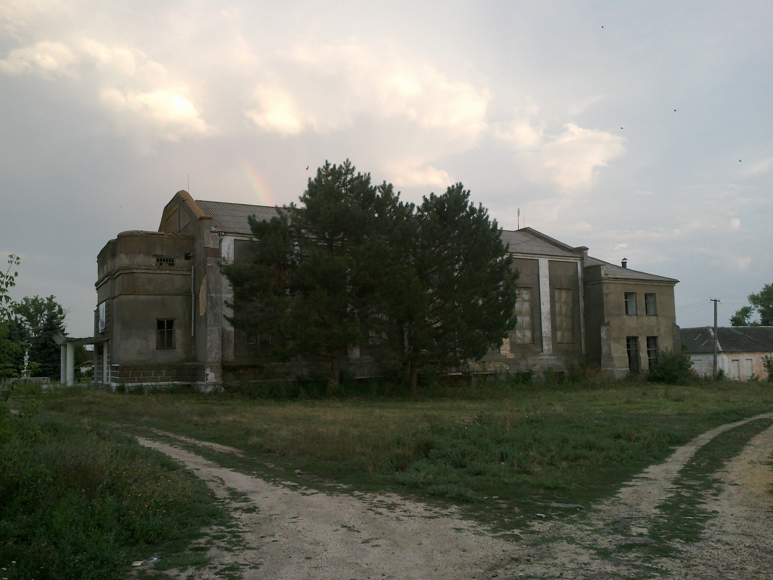 Собор Святих Ангелів-Хранителів (Щербанка)